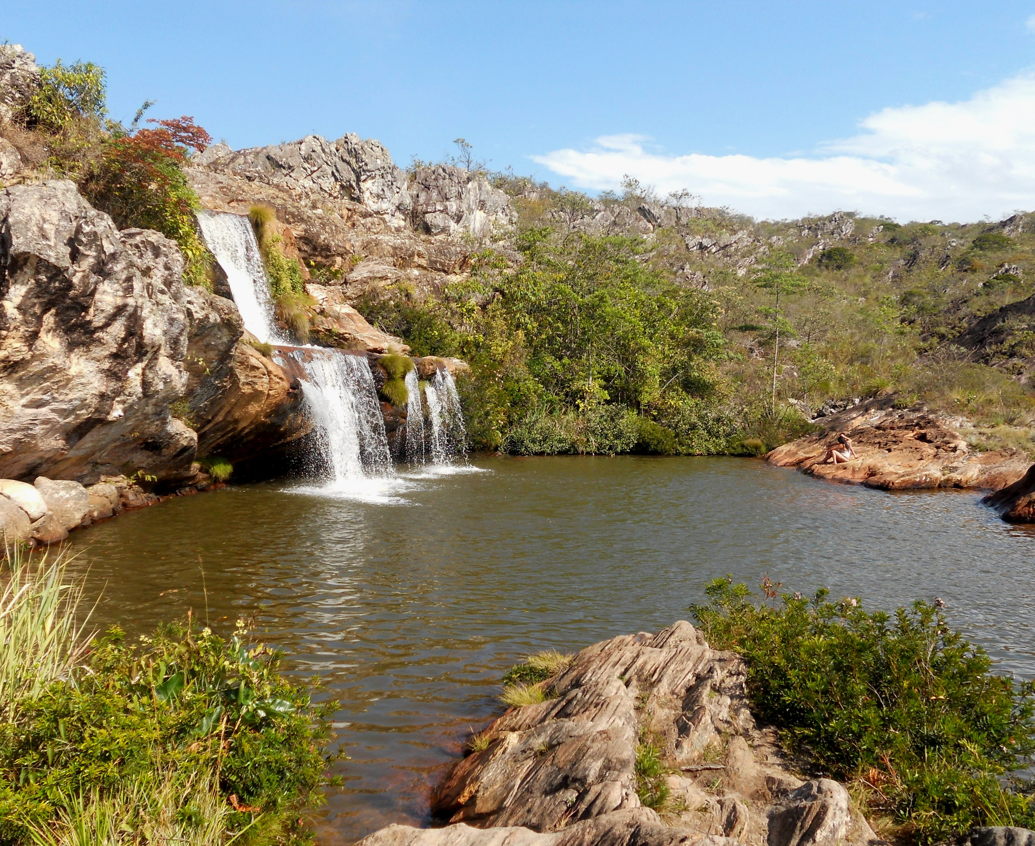 Situada no Parque Estadual do Biribiri a 12 km da cidade de Diamantina, Minas Gerais, Brasil.